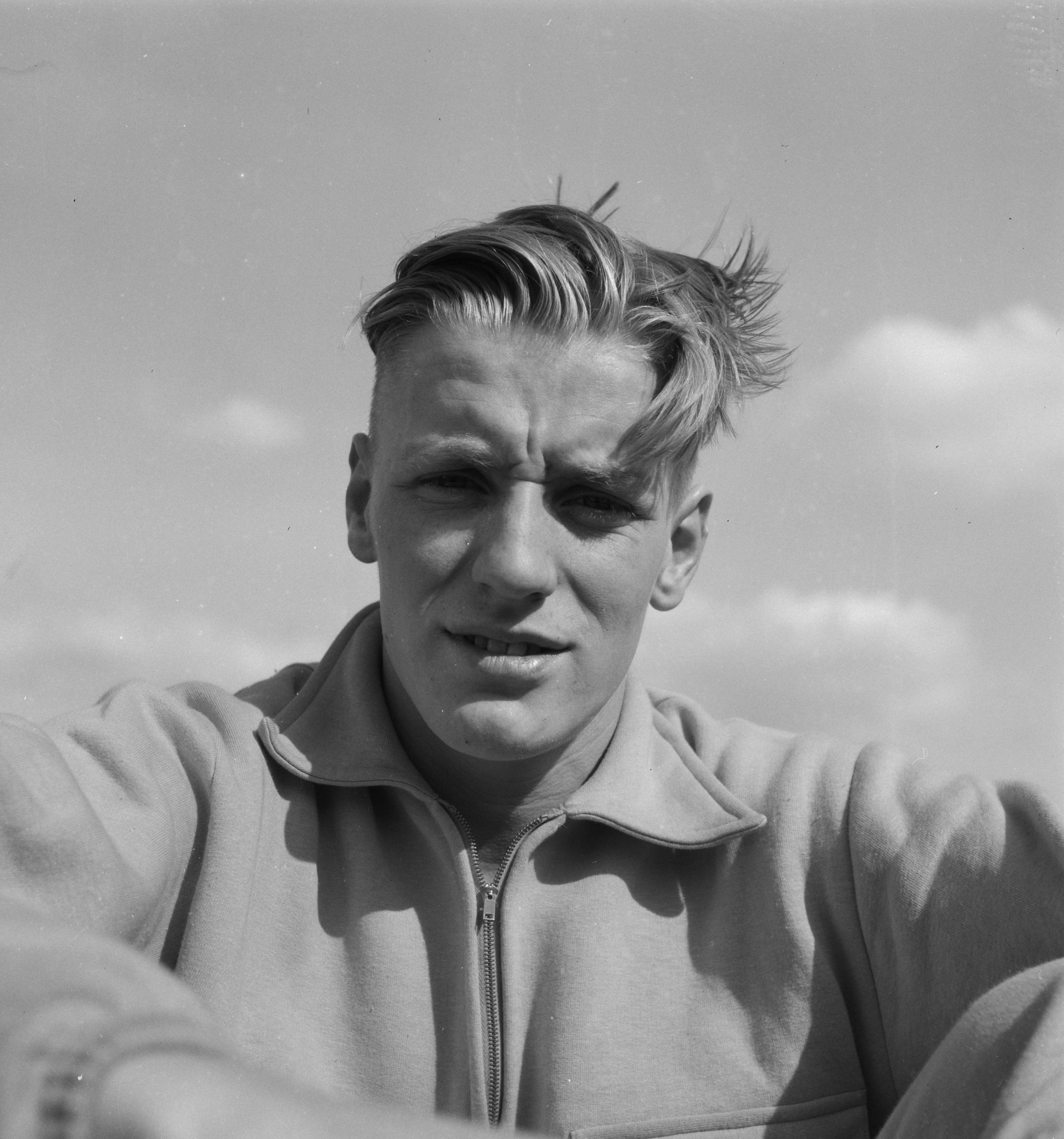 Collectie / Archief : Fotocollectie Anefo Reportage / Serie : [ onbekend ] Beschrijving : Atletiek Nederland tegen Noorwegen te Hengelo. De Friese sprinter Jan Lammers Datum : 20 augustus 1950 Locatie : Hengelo, Overijssel Trefwoorden : atleten, atletiek, portretten Persoonsnaam : Lammers, Jan Fotograaf : Noske, J.D. / Anefo Auteursrechthebbende : Nationaal Archief Materiaalsoort : Negatief (zwart/wit) Nummer archiefinventaris : bekijk toegang 2.24.01.03 Bestanddeelnummer : 904-1403